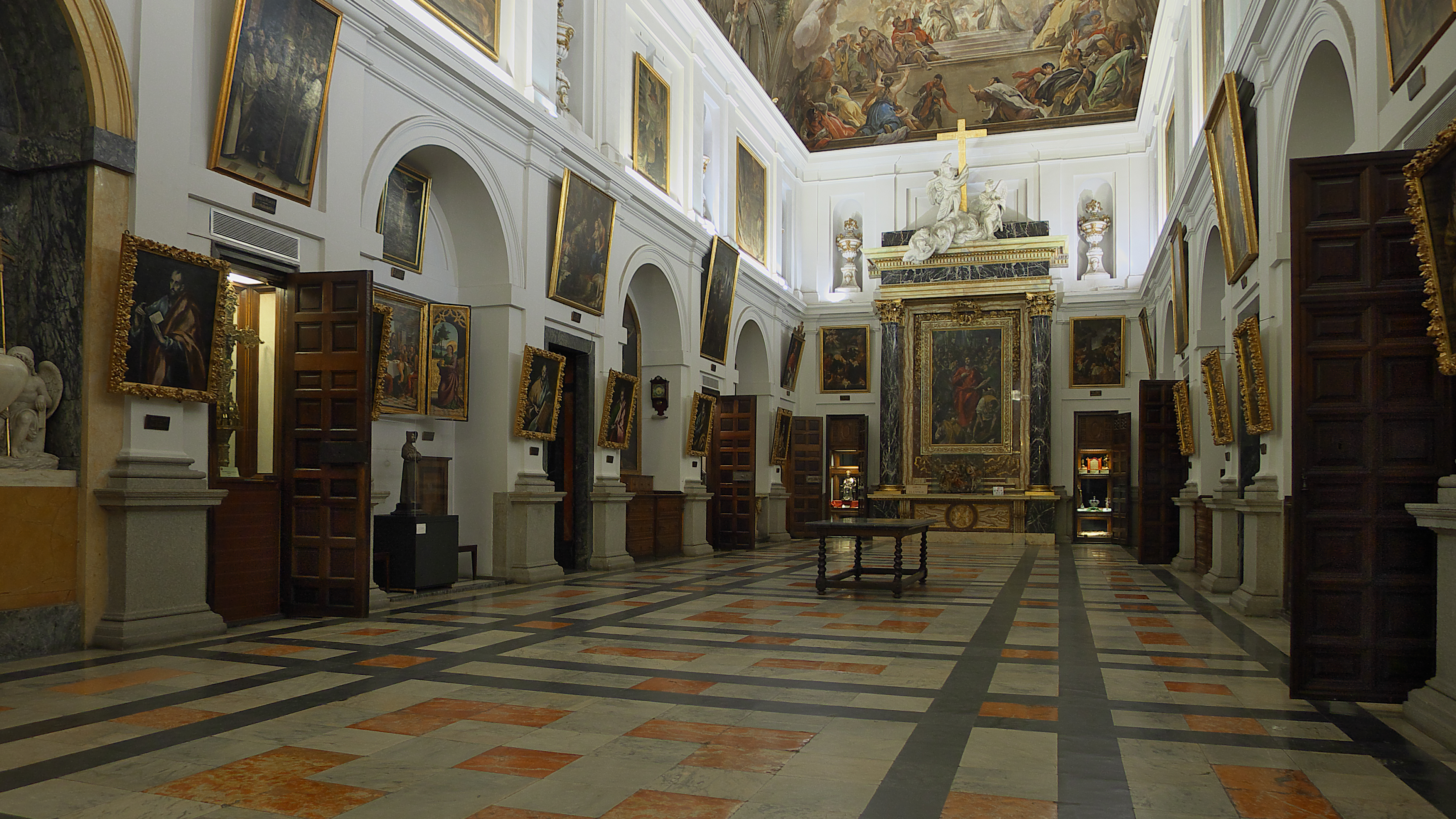 La decoración pictórica es de primera categoría entre El Greco con El Expolio y la bóveda con la soberbia pintura al fresco de Lucas Jordán, La Virgen imponiendo la casulla a San Idefonso